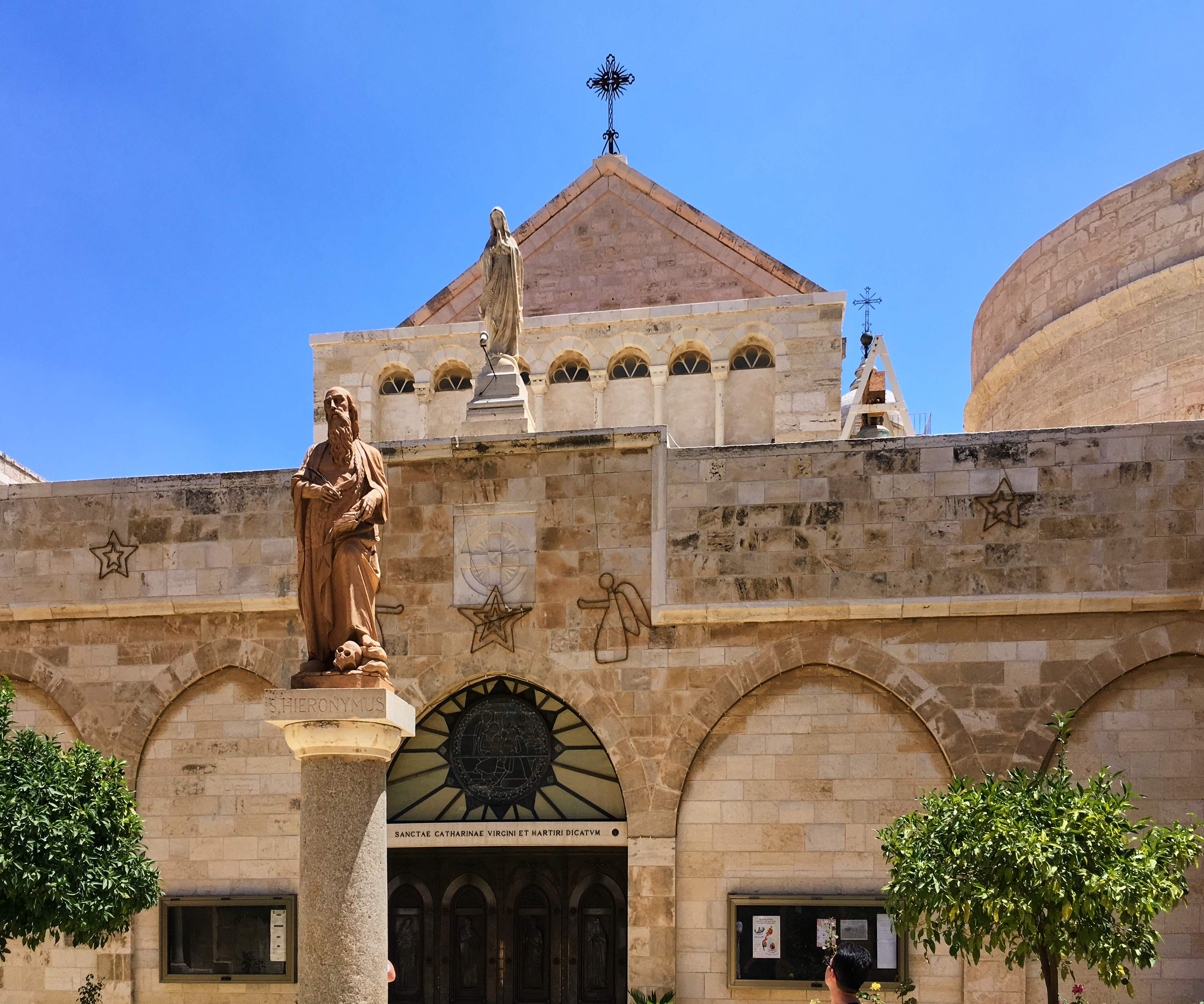 Церковь св. Екатерины